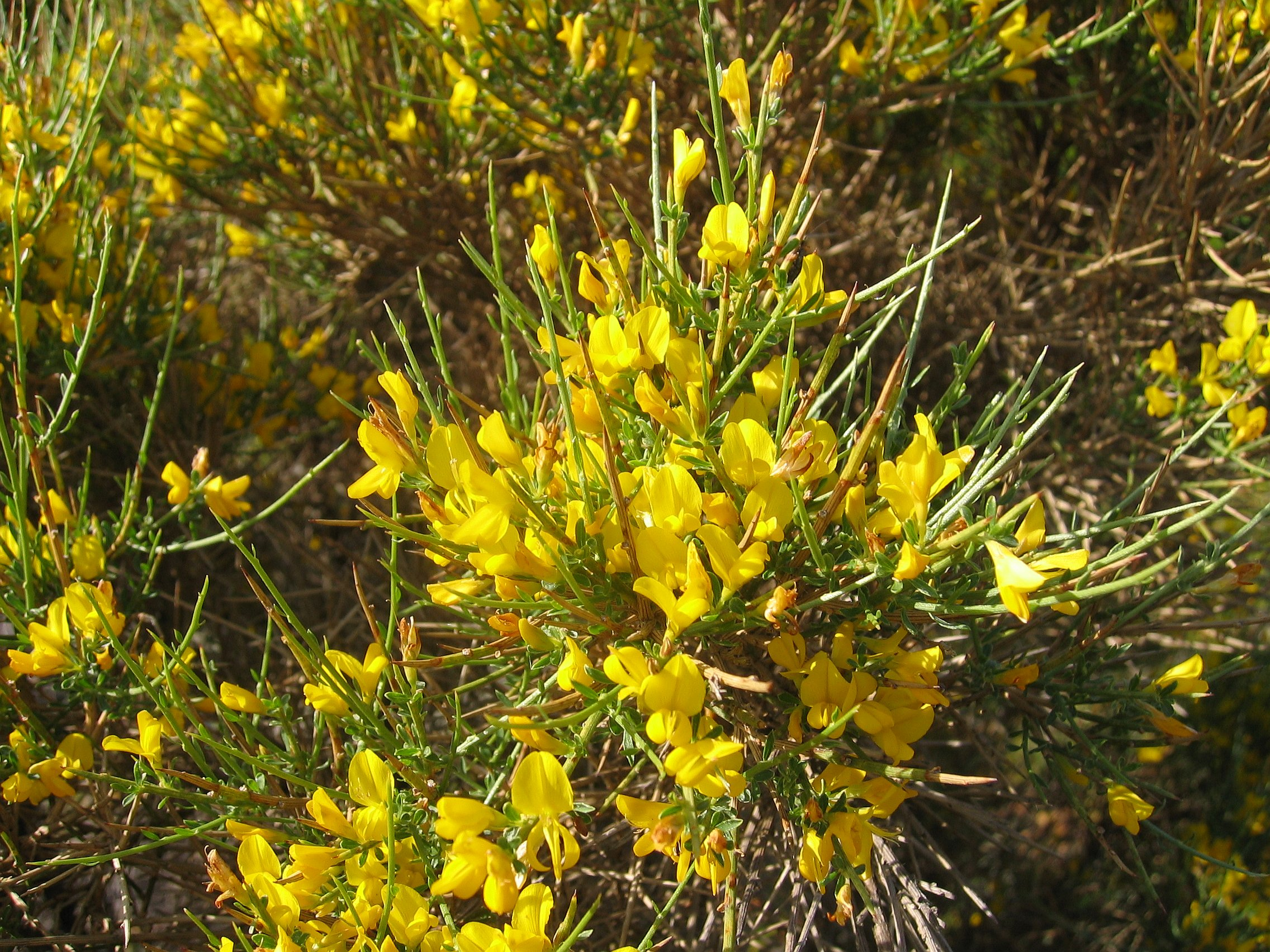 Genista salzmannii Calvi, Corse, France